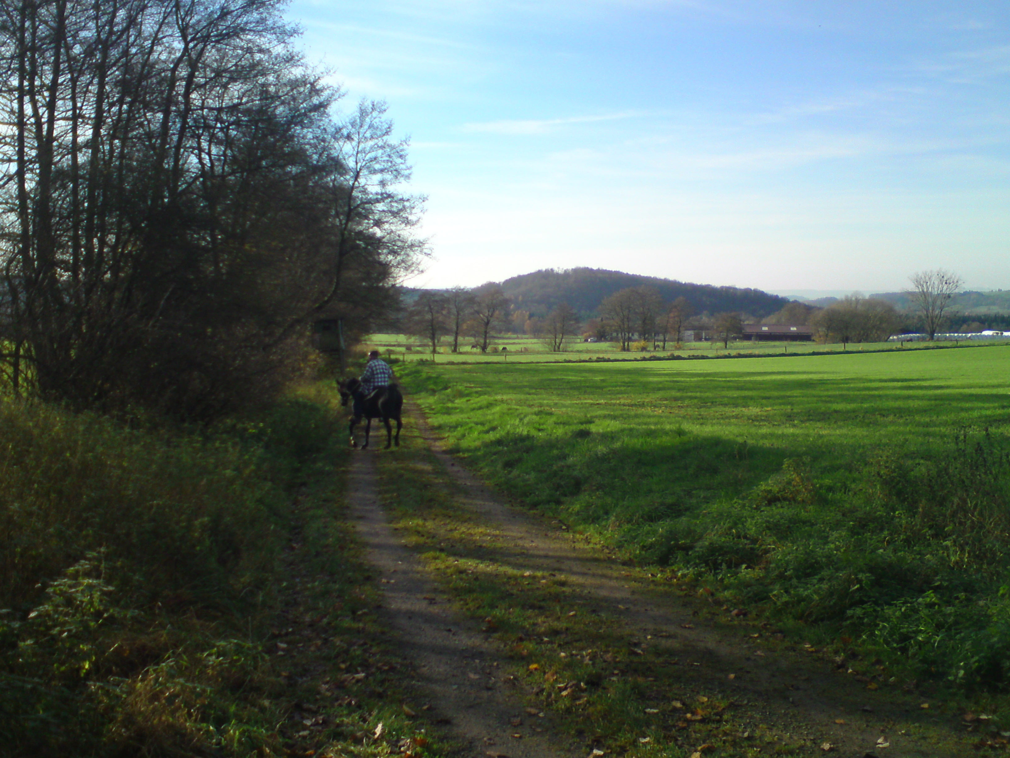 Weg parallel zum Faulbornbach (links), Blickrichtung Hage